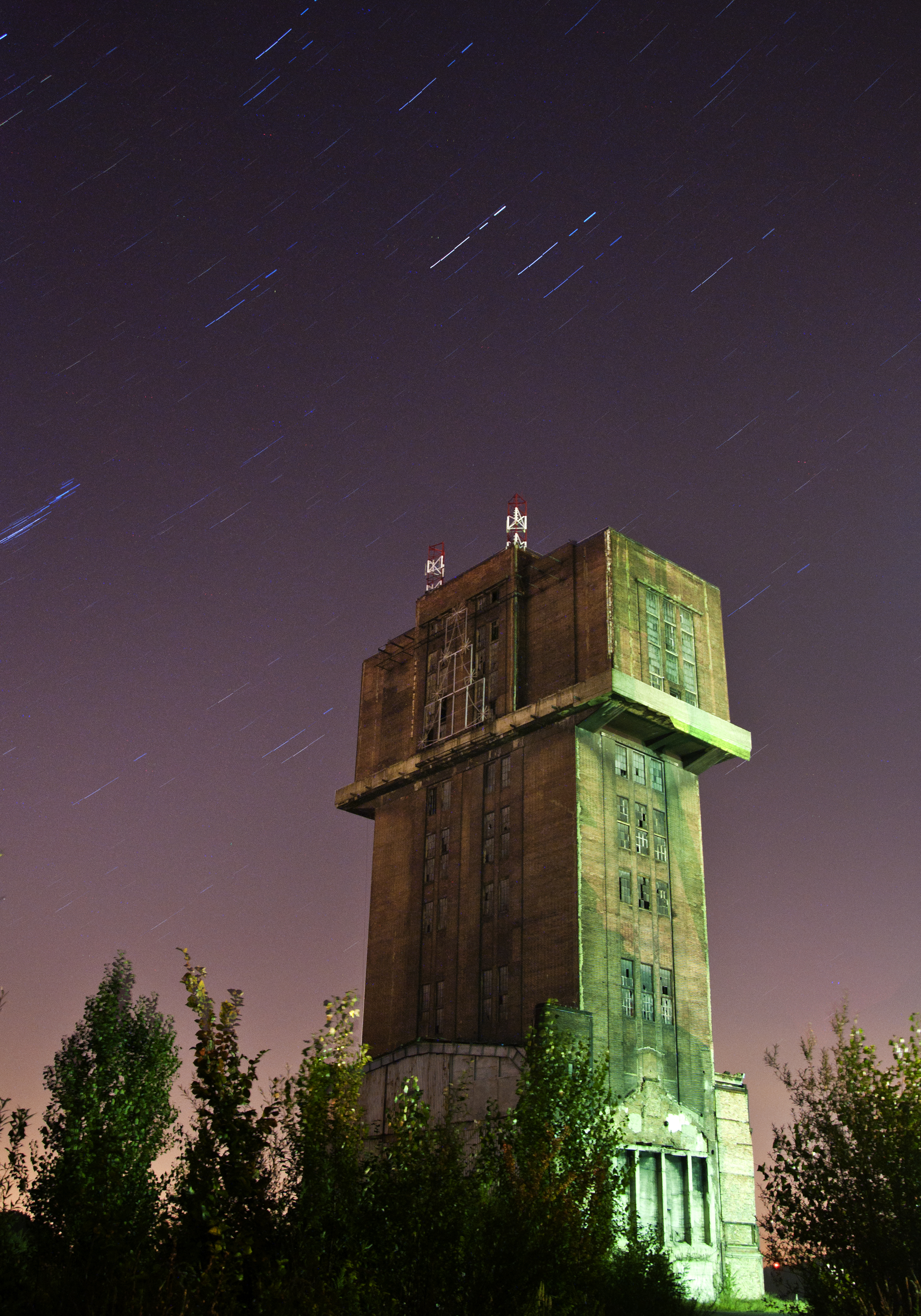 Szyb Krystyna w Bytomiu, nocą.